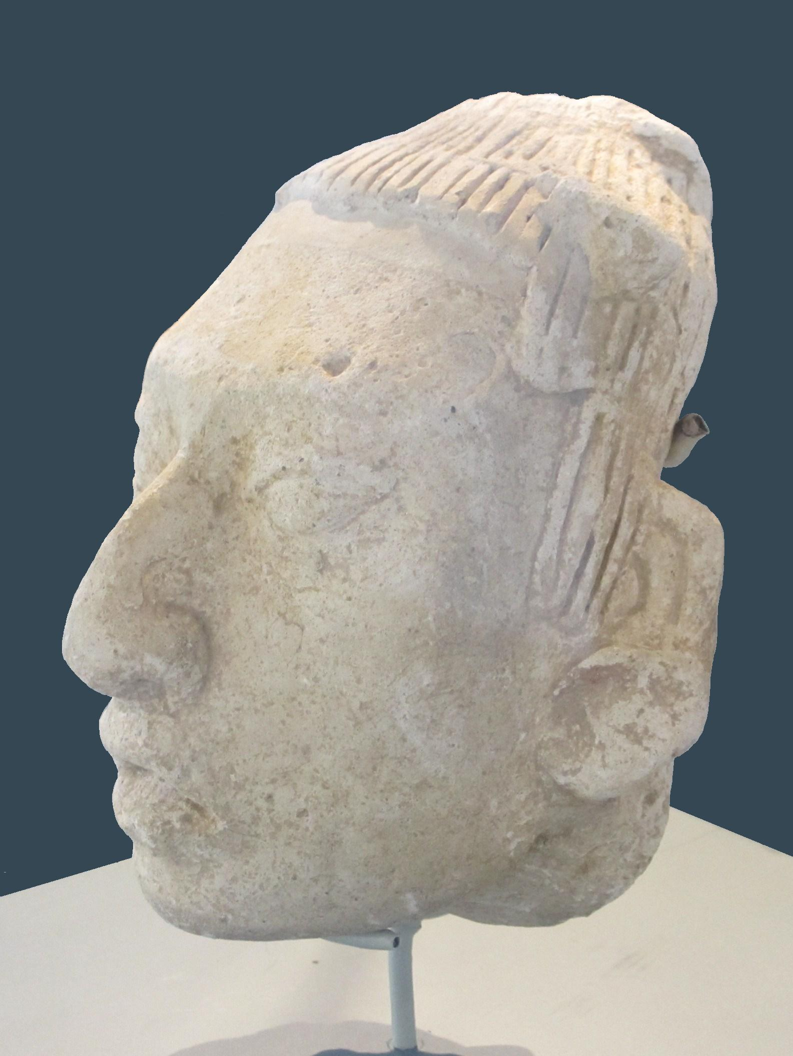 Cabeza maya. Zona arqueológica de Comalcalco. Tabasco. México.